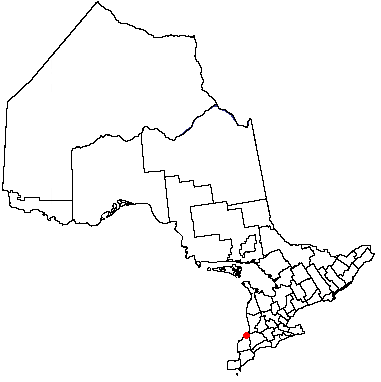 Volapük: Topam in provin: Ontario.